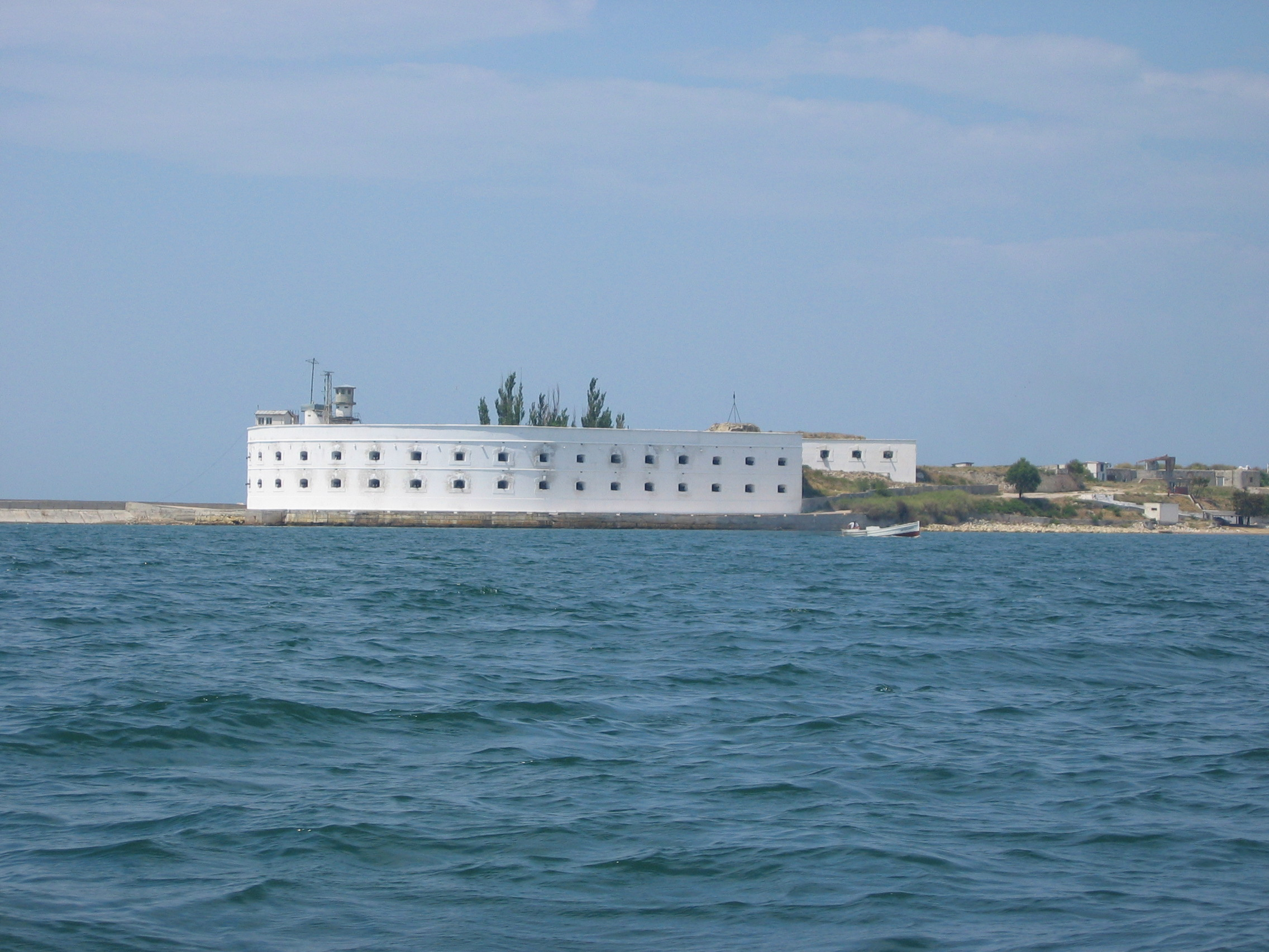 Fuerte Constantino, a la entrada del puerto de Sebastopol.